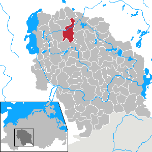 Weitendorf in Mecklenburg-Vorpommern - District Parchim